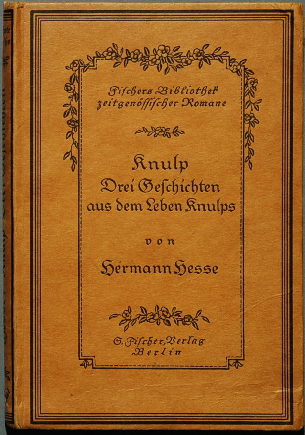 Hesse, Hermann: Knulp. Drei Geschichten aus dem Leben Knulps. Berlin: S. Fischer 1915 (= Fischers Bibliothek zeitgenössischer Romane. Reihe 6 [Band 10])